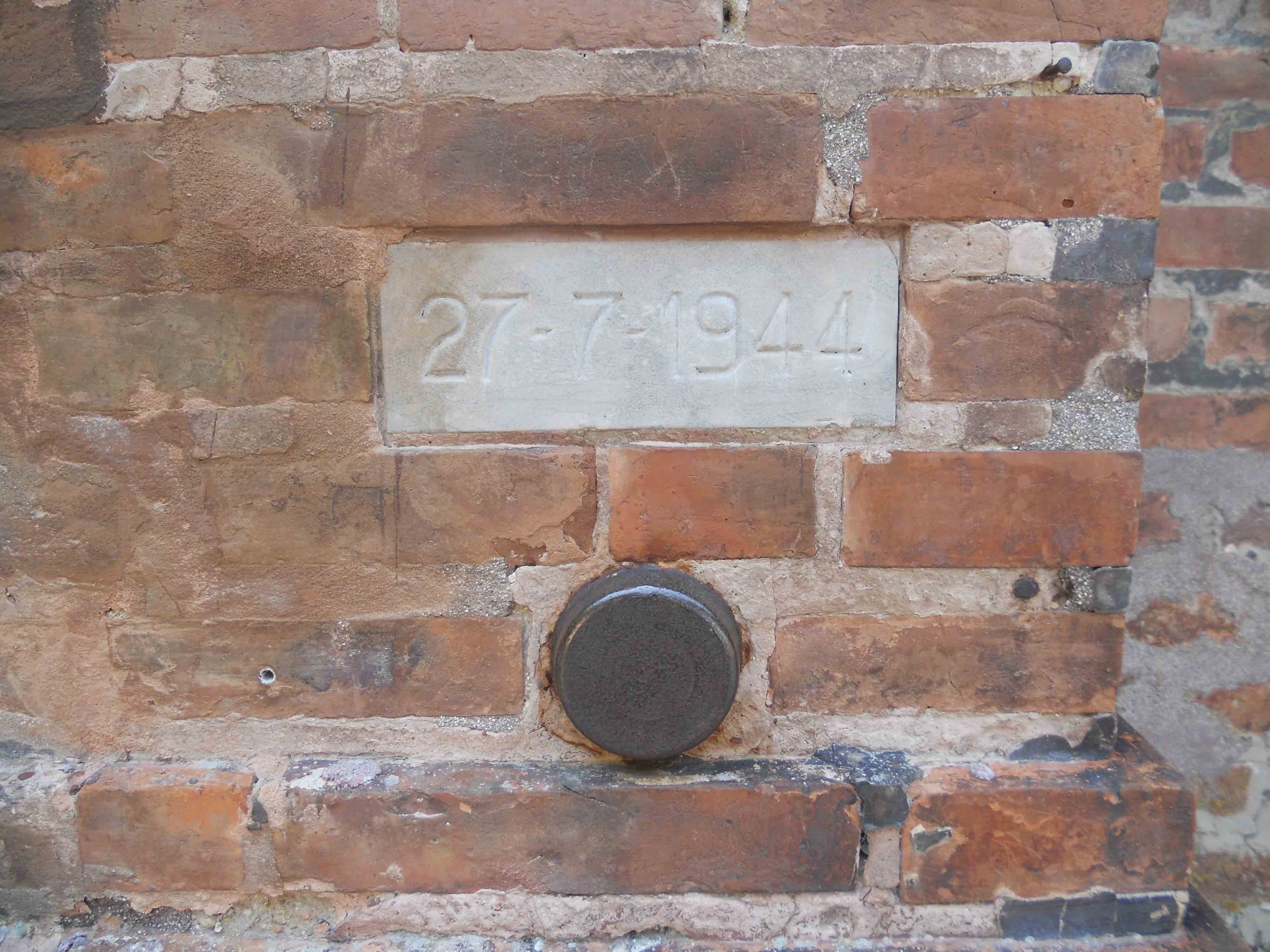 Bomba inesplosa sulla facciata della Collegiata di Montecarotto